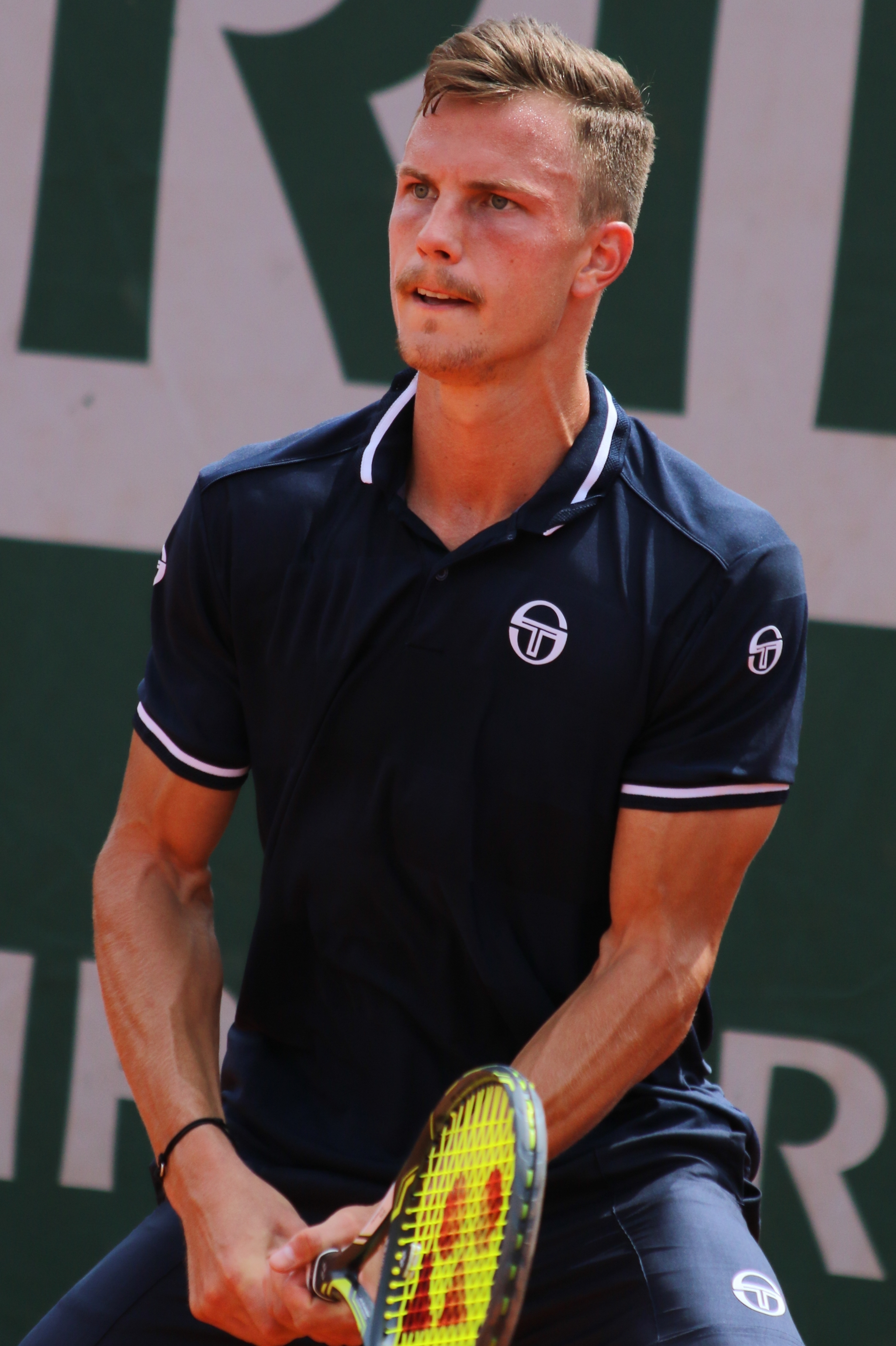 Fucsovics RG18 (41)